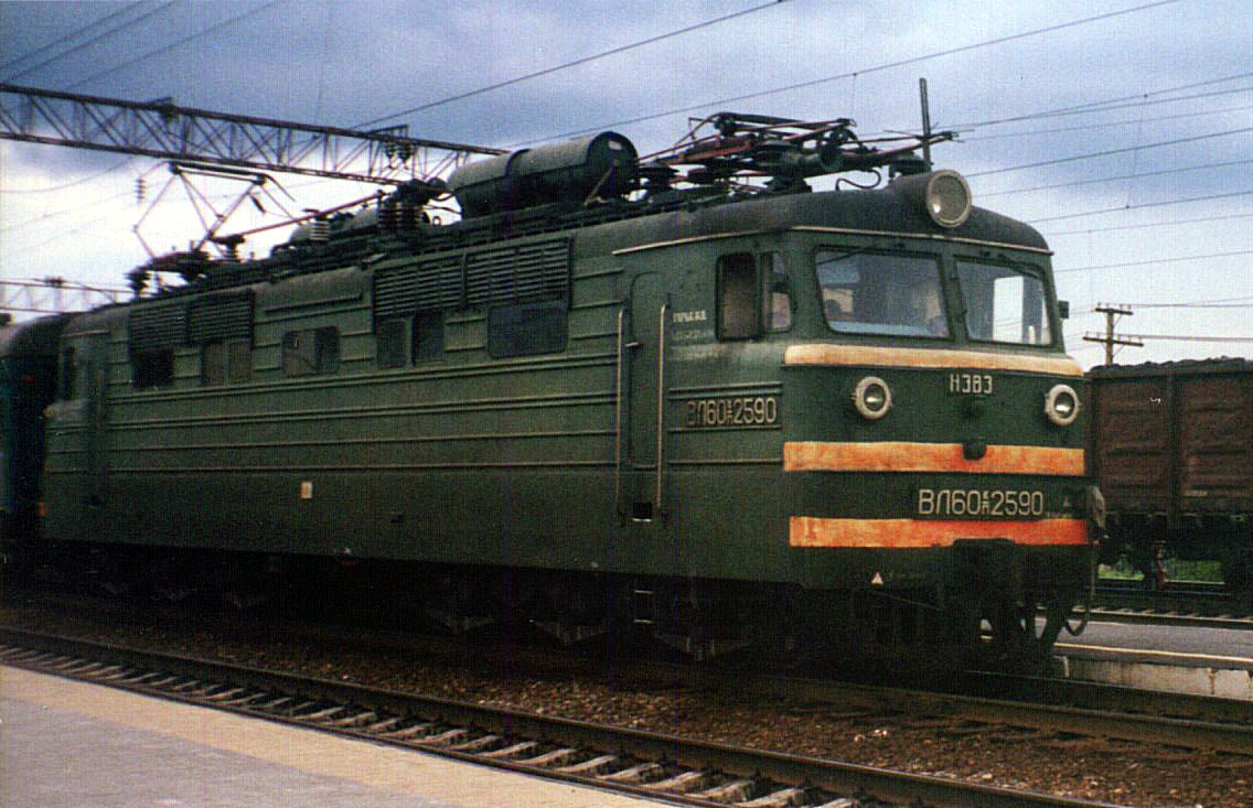 Elektra lokomotivo de tipo VL60k/p (ВЛ60к/п). Lokomotivoj de diversaj tipoj de serio VL60 estis produktataj en Sovetunio ekde jaro 1957 gxis jaro 1967. Mi, auxtoro de la bildo, permesas al cxiuj uzi gxin kun cxi tiuj kondicxoj: La fonta bildo de cxi tiu bildo estas ankaux en mia propra retpagxaro [1]